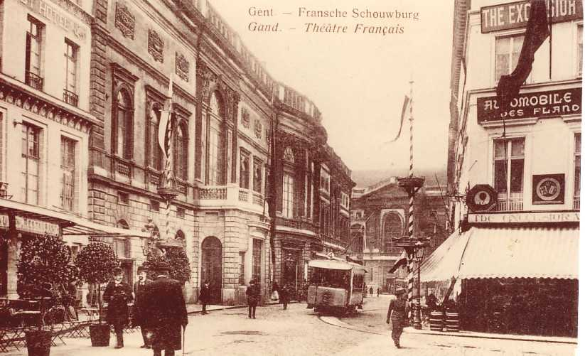 Schouwburgstraat voor 1914